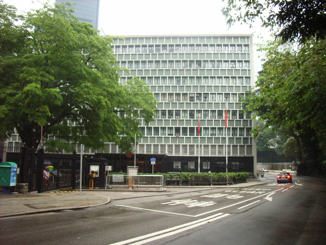 下亞釐畢道18號, 中區政府合署(主樓) AlbertCotton